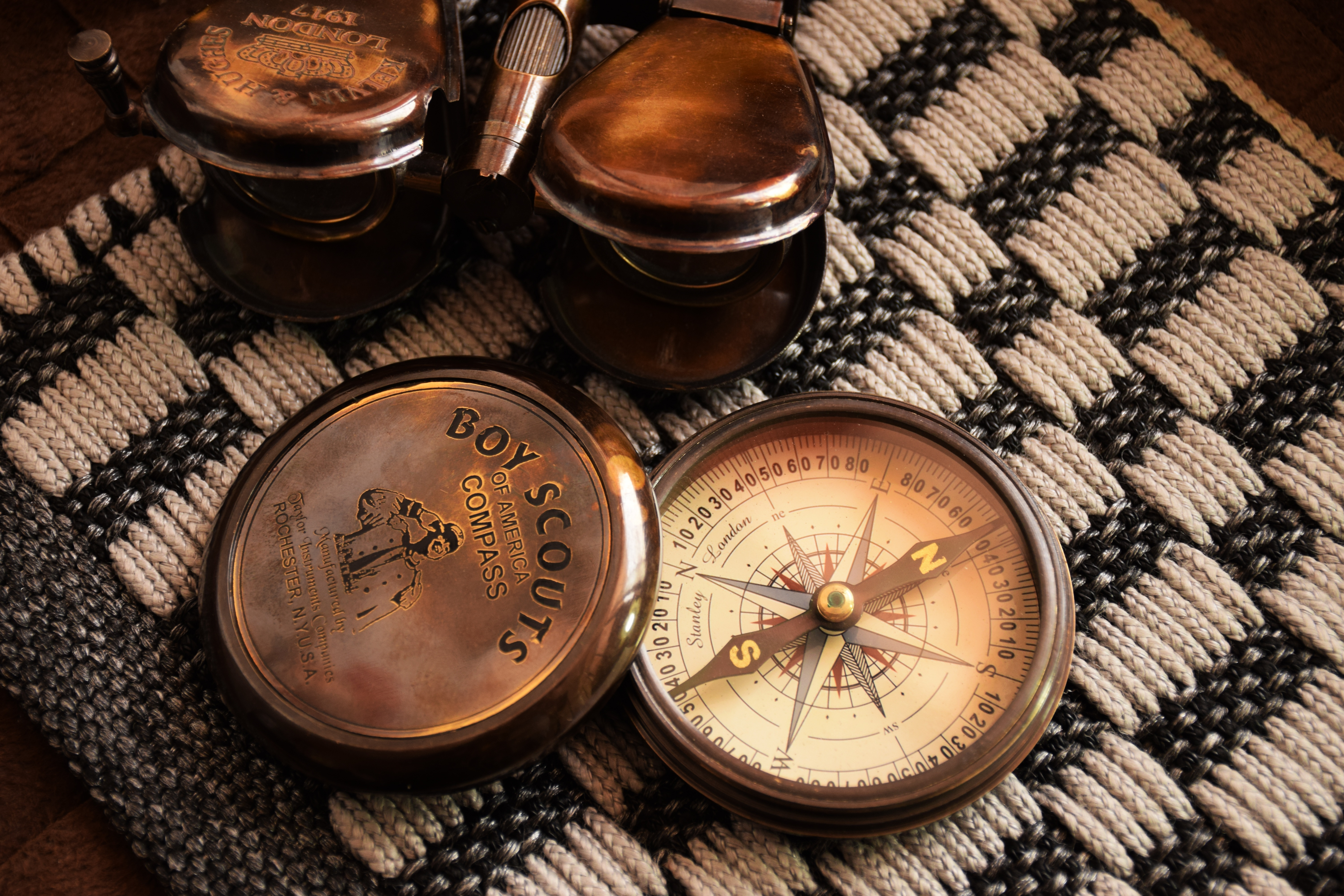 Bild Compass